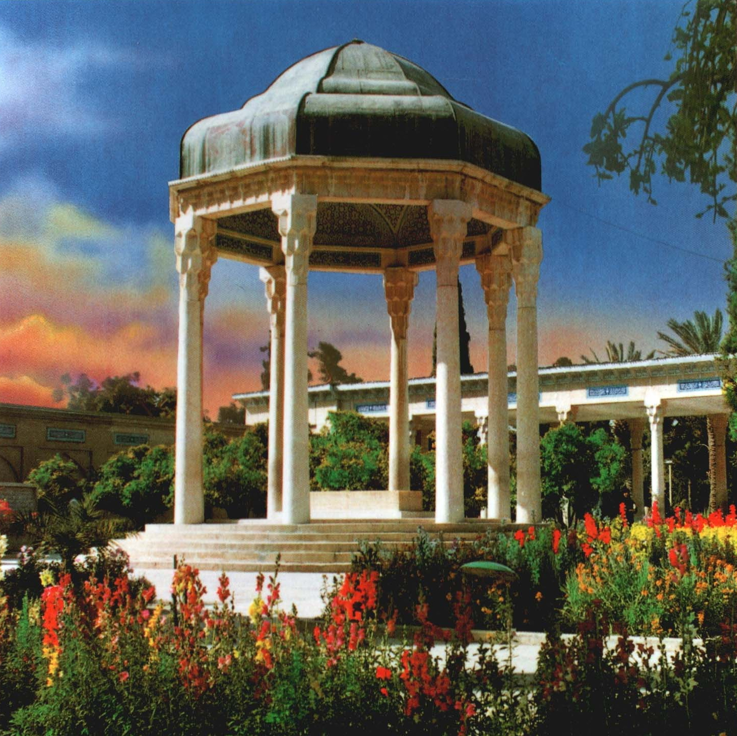 Hafez mausoleum i Shiraz